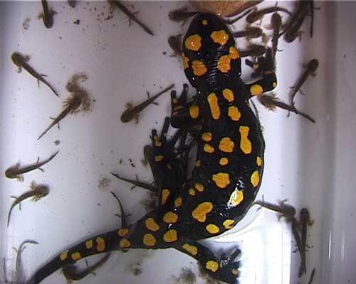 נקבת סלמנדרה מצויה וראשנים שזה עתה השריצה